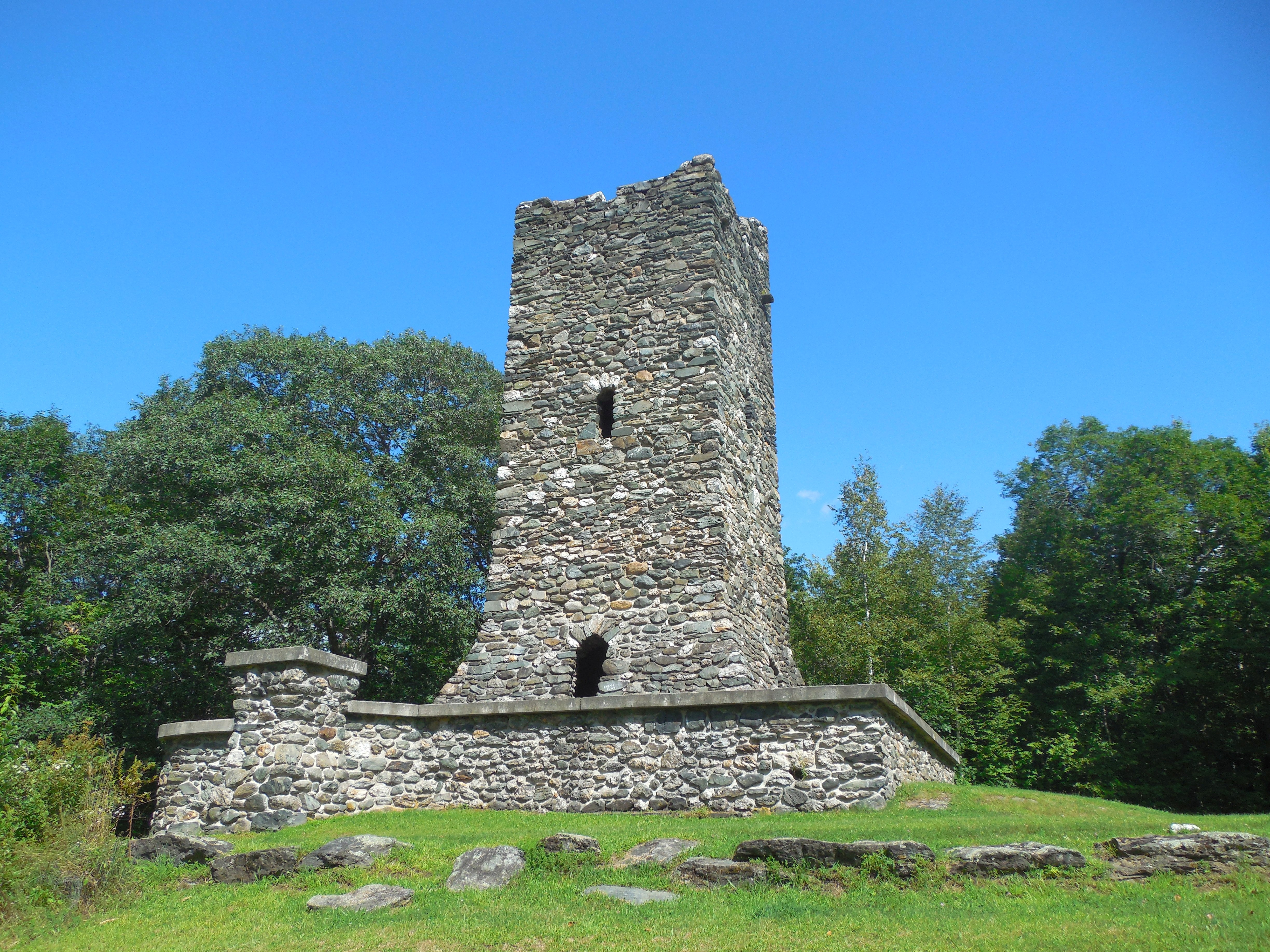 Hubbard Park Observation Tower in Montpelier, Vermont (looking eastward), August 2017